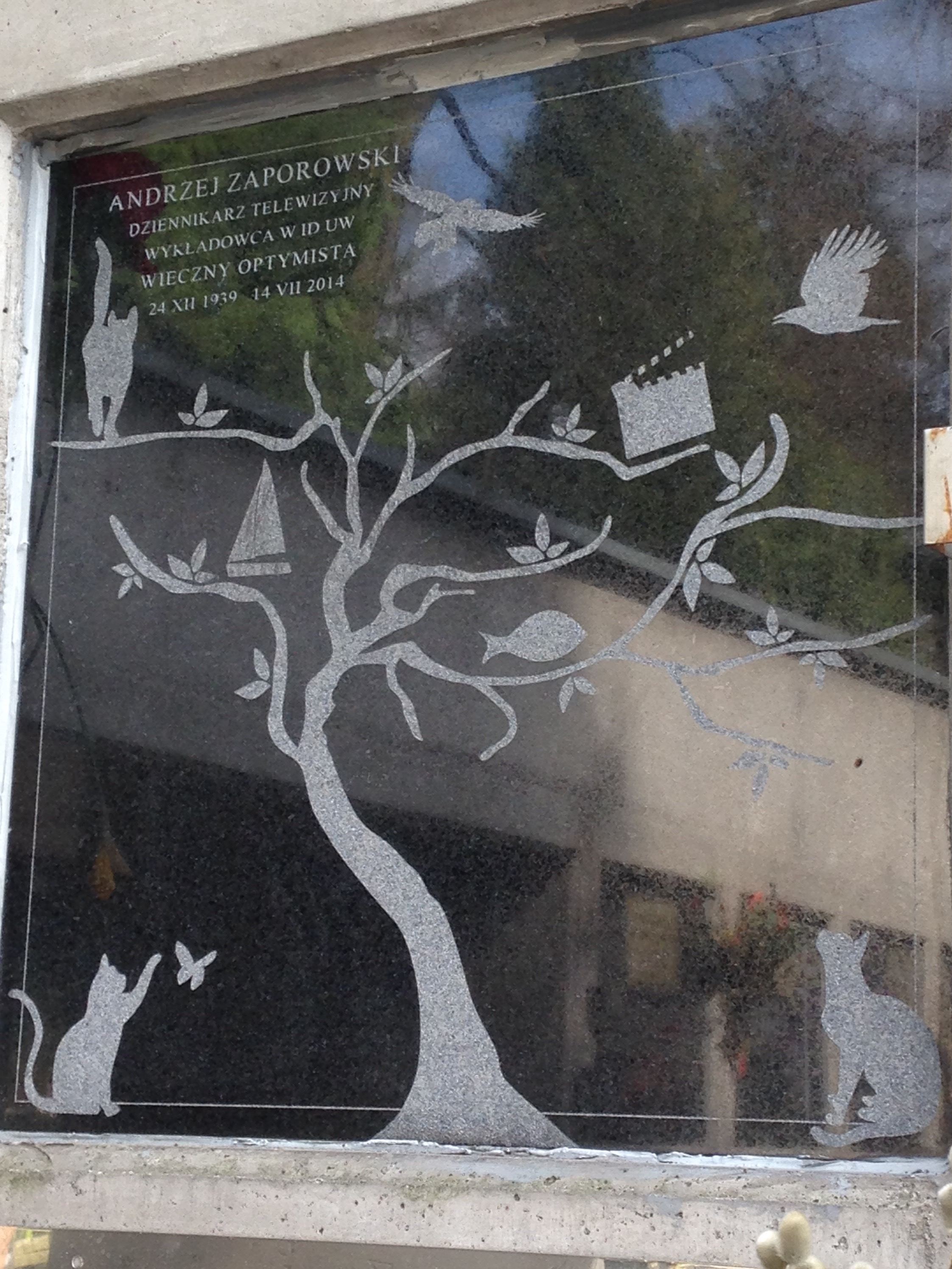 Wieczny optymista